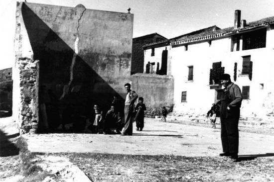 Antiguo Juego de Pelota construido en 1807. En su tiempo fue uno de los primeros de La Rioja. Actualmente, en su ubicación se halla el antiguo Guarderío.